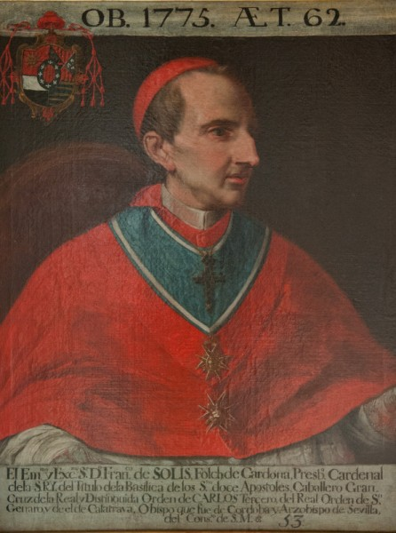 Retrato del cardenal español Francisco de Solís y Folch de Cardona (1713-1775), que llegó a ser obispo de Córdoba y arzobispo de Sevilla.